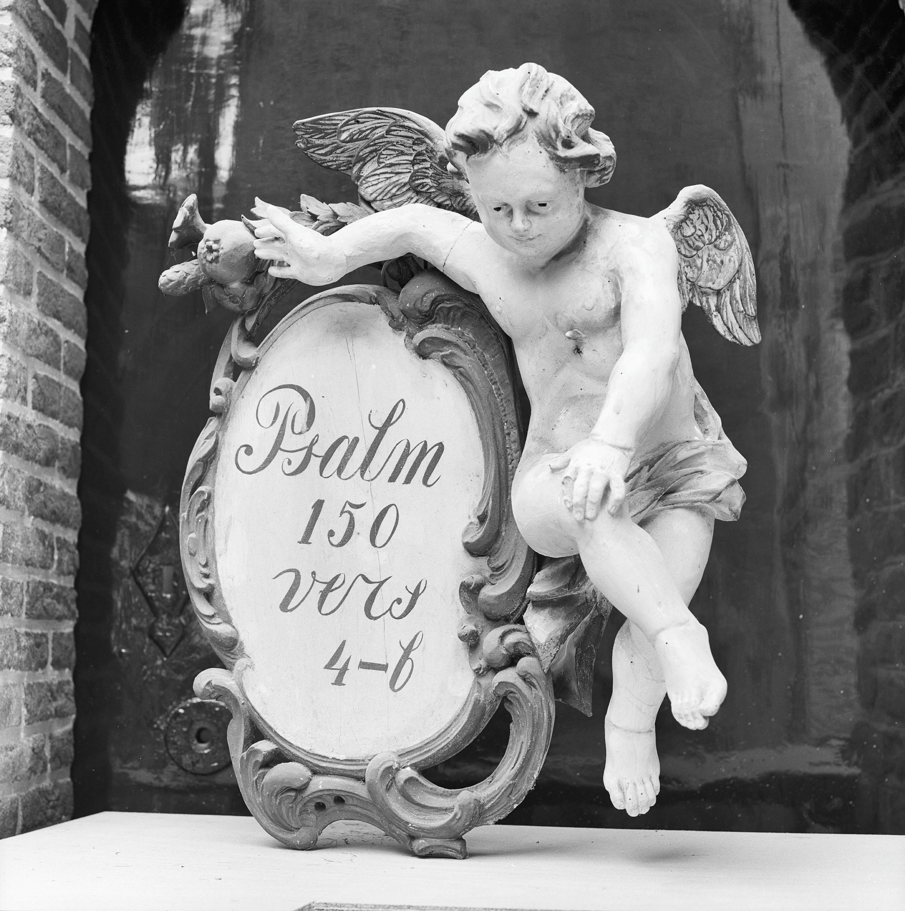 N.H.Kerk: engel met psalmbord